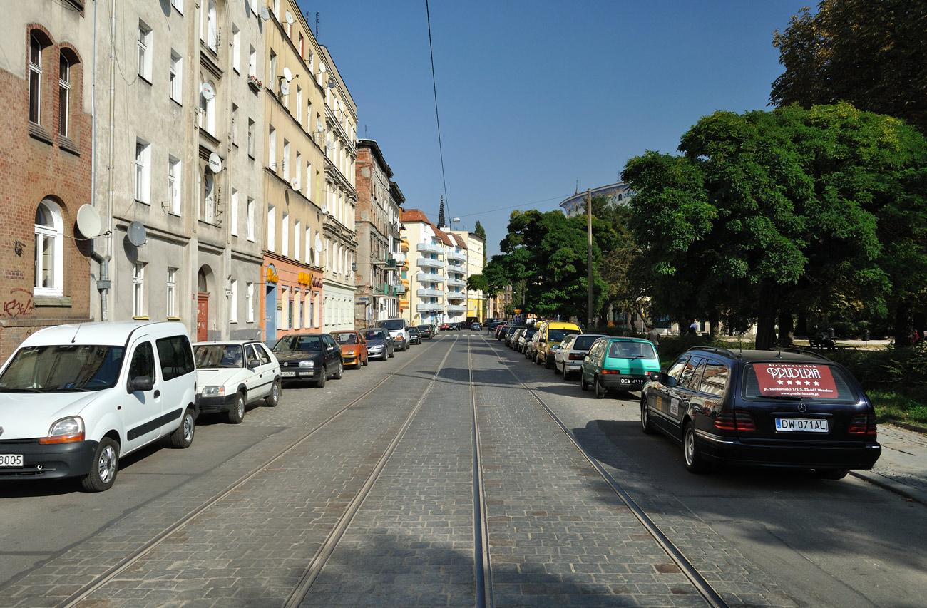 Ulica Prusa - widok w stronę Żeromskiego.